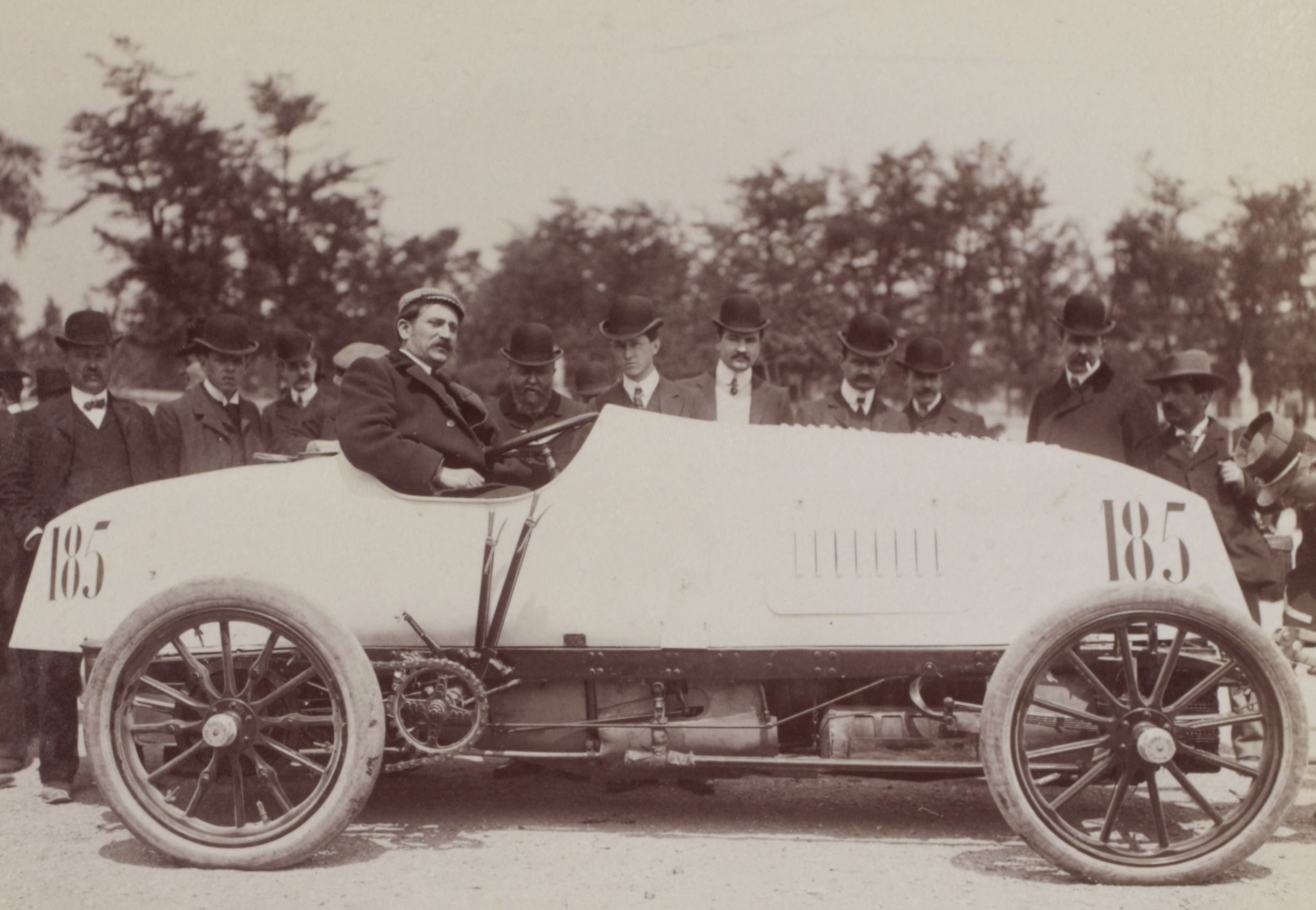 [Collection Jules Beau. Photographie sportive] : T. 21. Année 1903 / Jules Beau : F. 33v. [Paris - Madrid, Tuileries, 19 - 22 mai 1903]